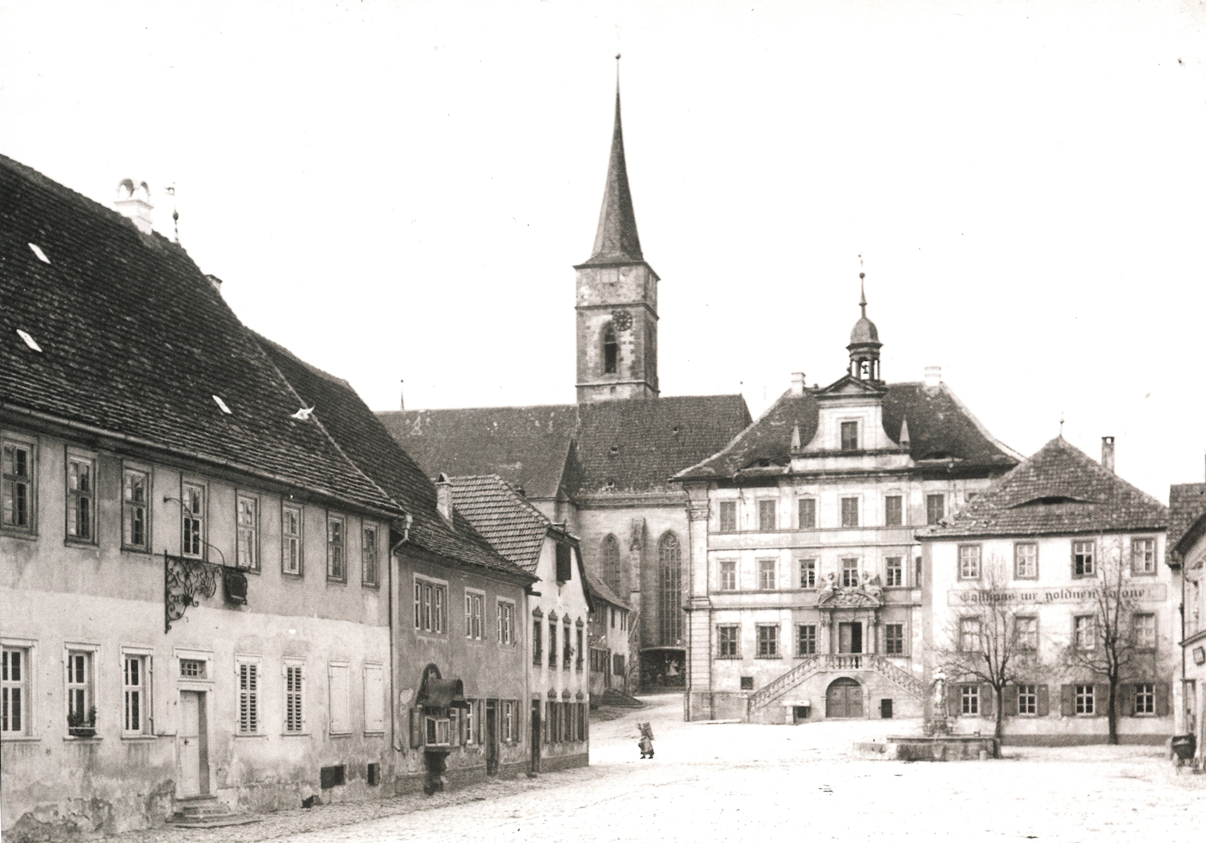 Fotografie: Marktplatz Iphofen, 1908, von links nach rechts: Gasthaus zur goldenen Sonne (heute Sparkasse), Bäckerei Keupp (mit Brotreiche), St. Veit, Rathaus, Gasthaus zur Goldenen Krone (vor Umbau)